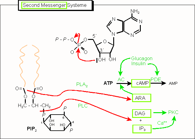 korrigierte Version zum Artikel Lizenzstatus: GNU FDL Juergen Bode 07:17, 9. Jul 2004 (CEST)